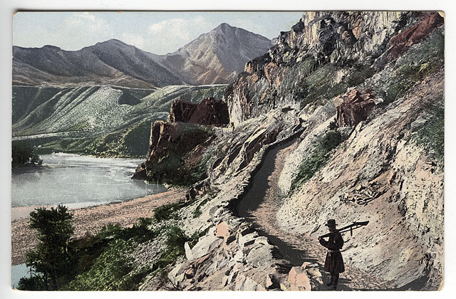 Чуйский тракт. На склонах бома Кынграр. Выше впадения в реку Катунь реки Малый Еломан